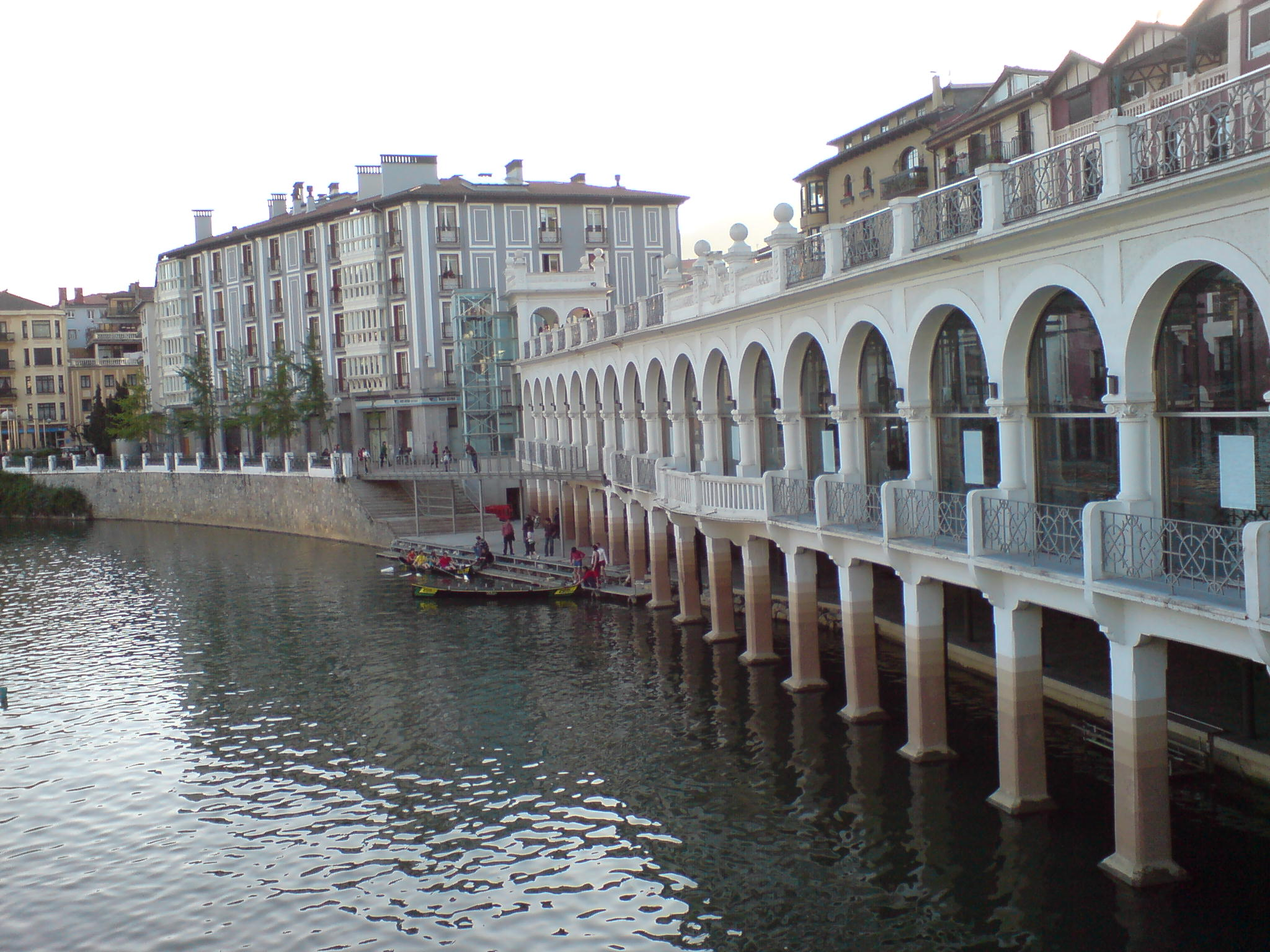 Tolosa Tinglado del Mercado y muelles sobre el Oria